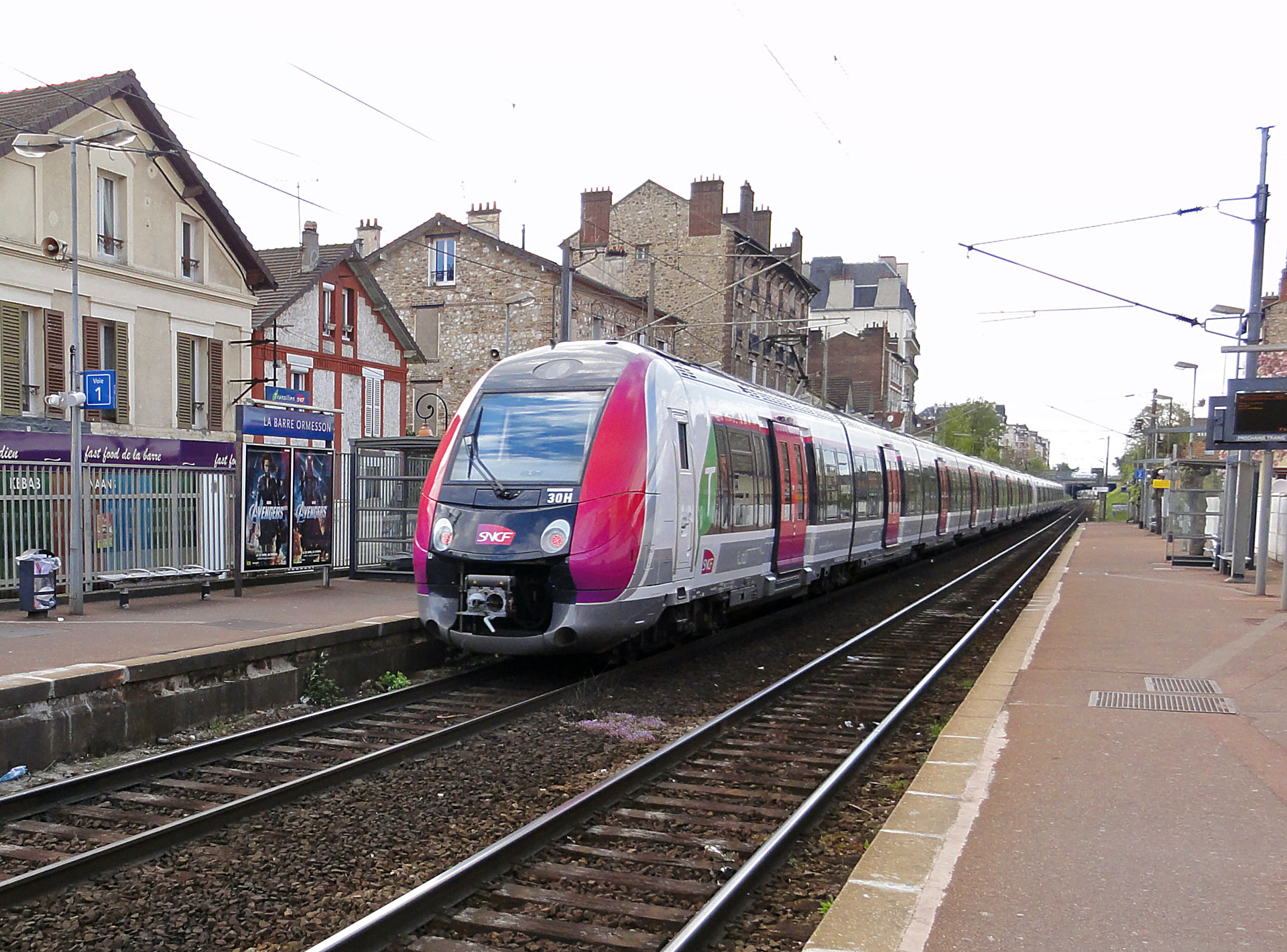 Rame Z 50000 quittant la gare de La Barre - Ormesson en direction de Persan-Beaumont, à Deuil-la-Barre, Val-d'Oise, France.